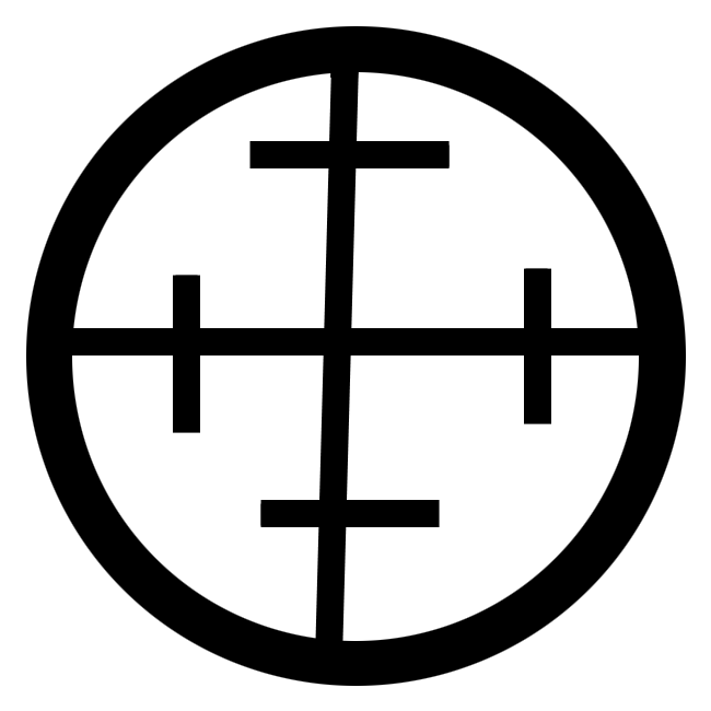 Schwertfegermarke auf dem Reichsschwert in Form eines Wiederkreuzes.